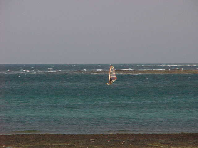 Corralejo